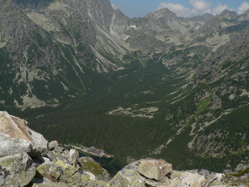 Pohled do Mengusovské doliny ze sedla pod Ostrvou.